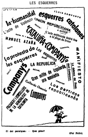 373 25.5.1935 humanitat